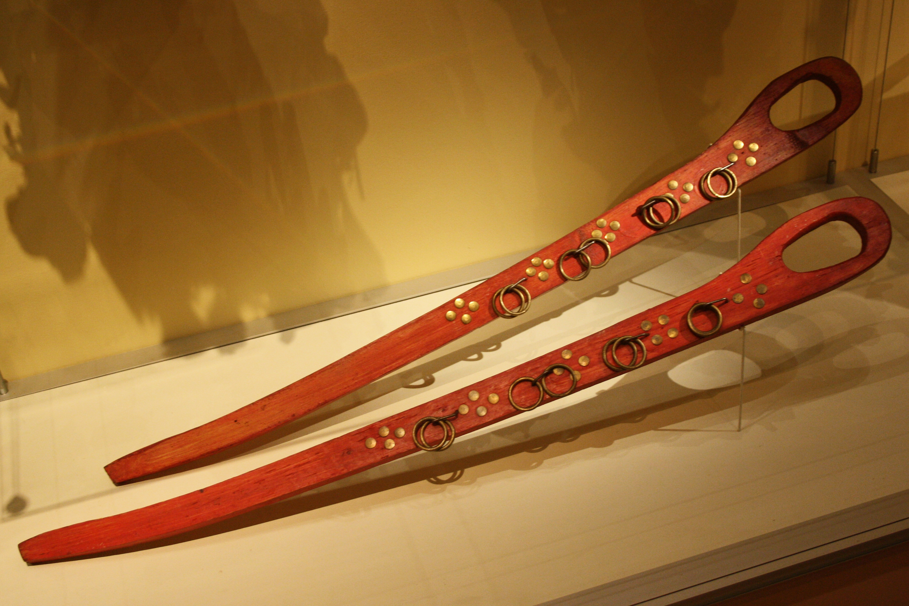 Národopisné muzeum - Musaion